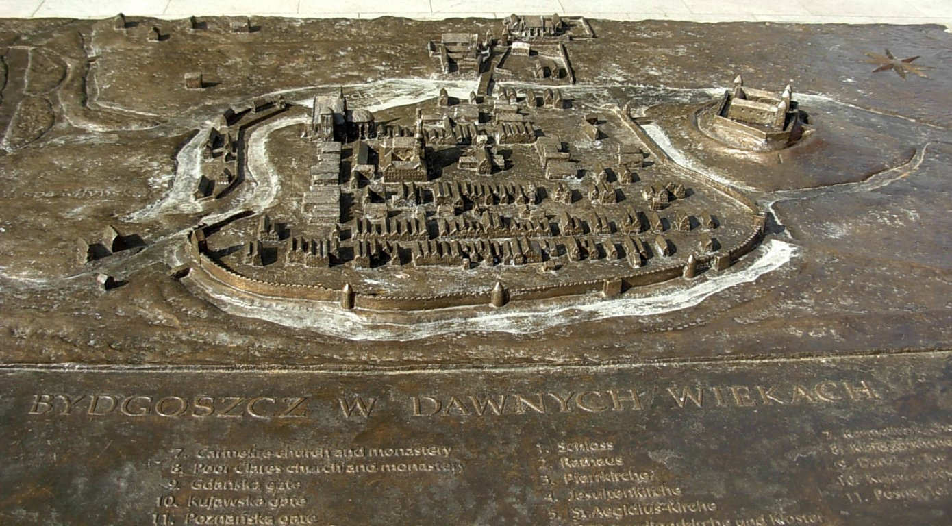 Makieta Bydgoszczy staropolskiej stojąca przy spichrzach na Starym Mieście w Bydgoszczy